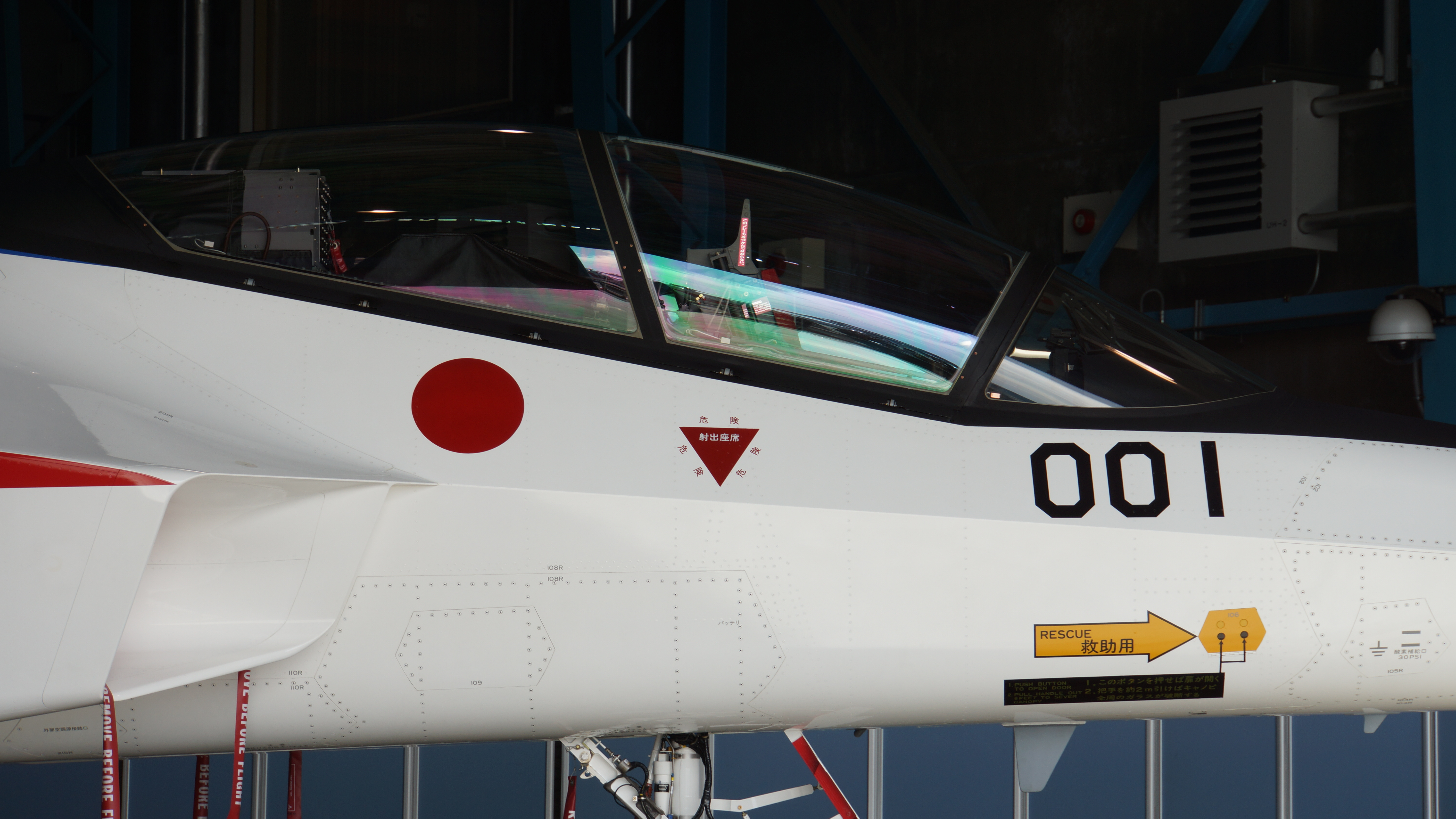 三菱 先進技術実証機 X-2（51-0001号機） 機首コックピット部分 右側面。2016年10月30日 航空自衛隊岐阜基地にて。